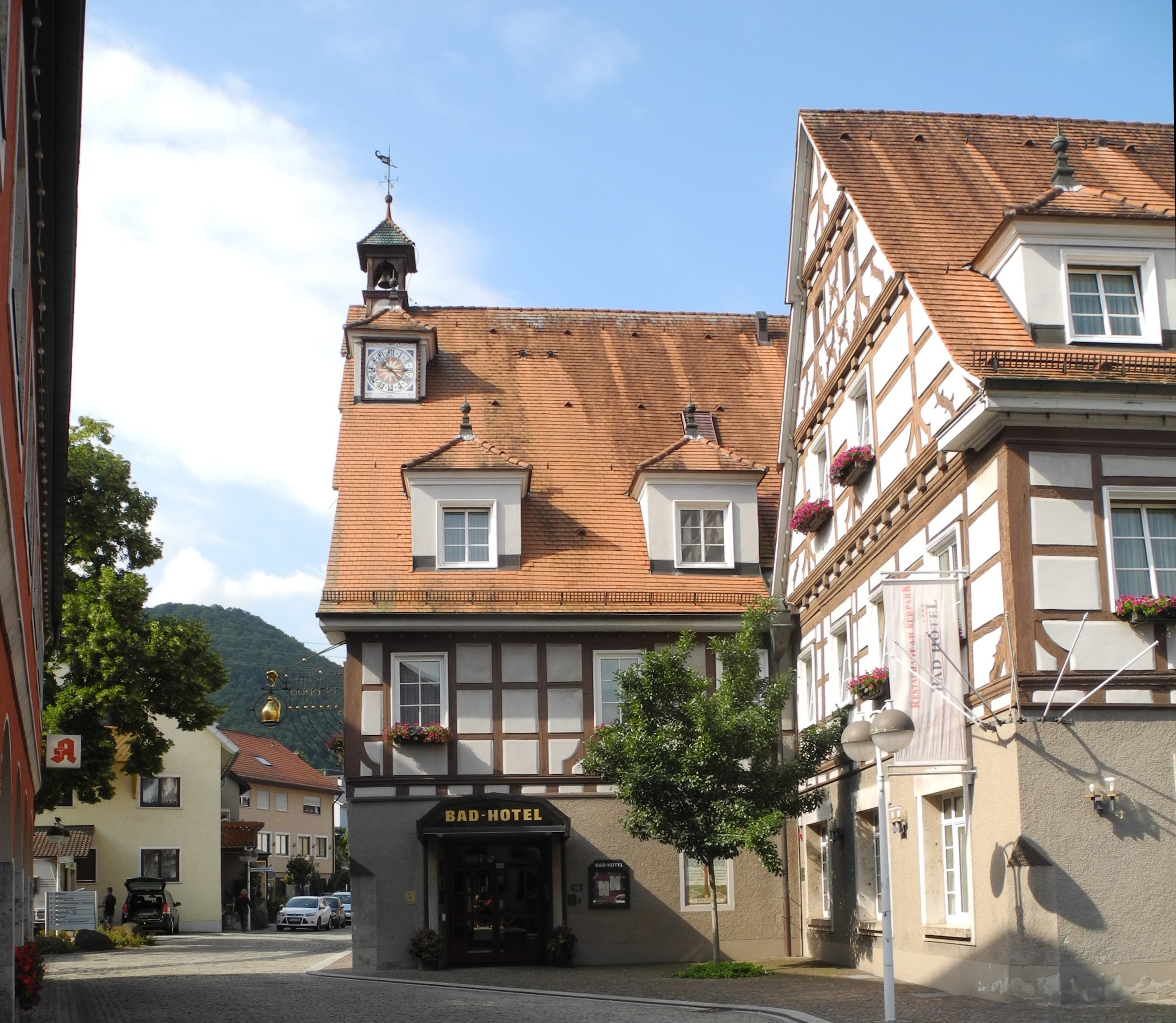 Bad Überkingen - Altes Rathaus1553,Ortsmitte